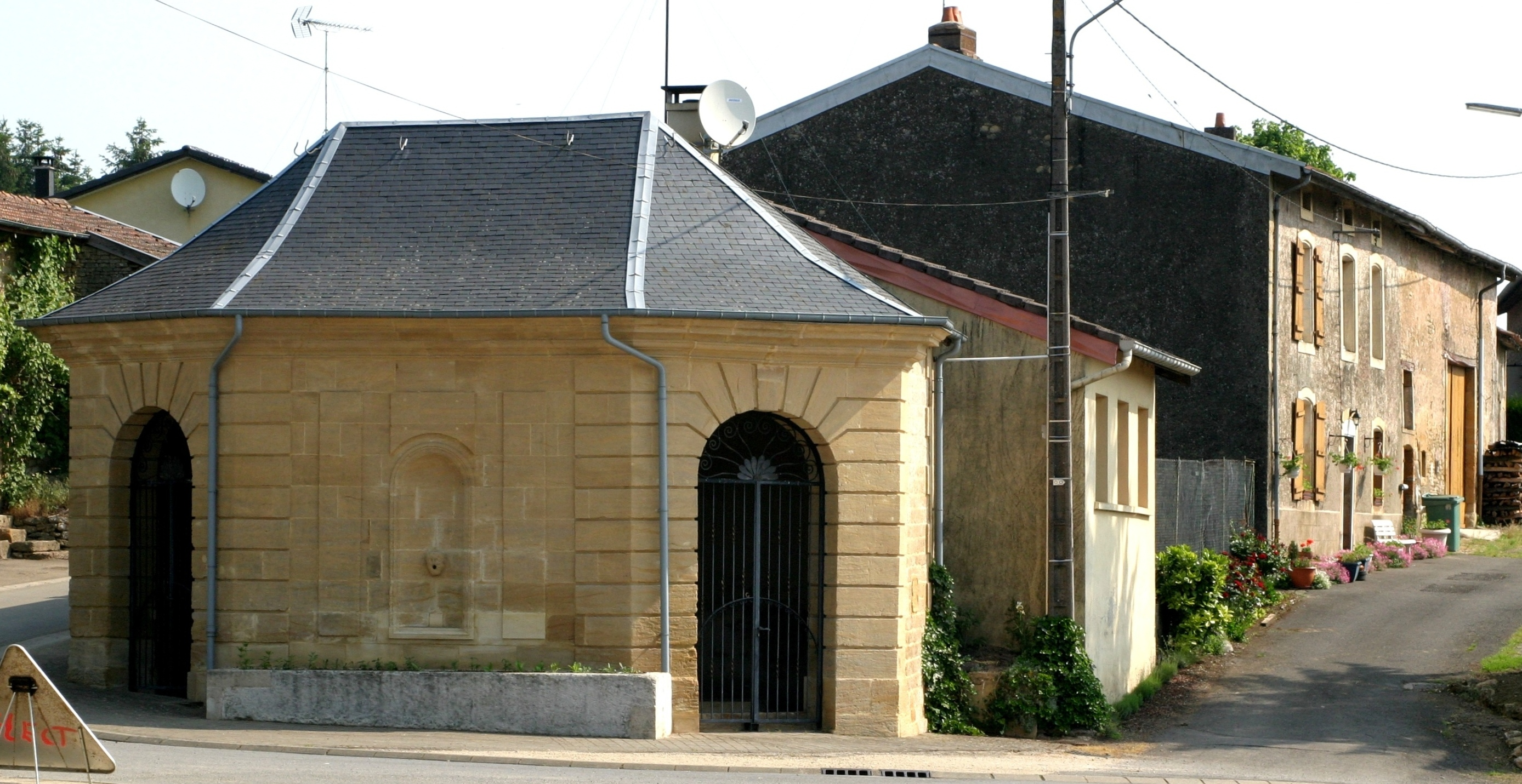 Lavoir de Grand-Failly